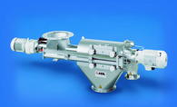 Wirbelstrom-Siebmaschine Typ DA der AZO GmbH + Co. KG